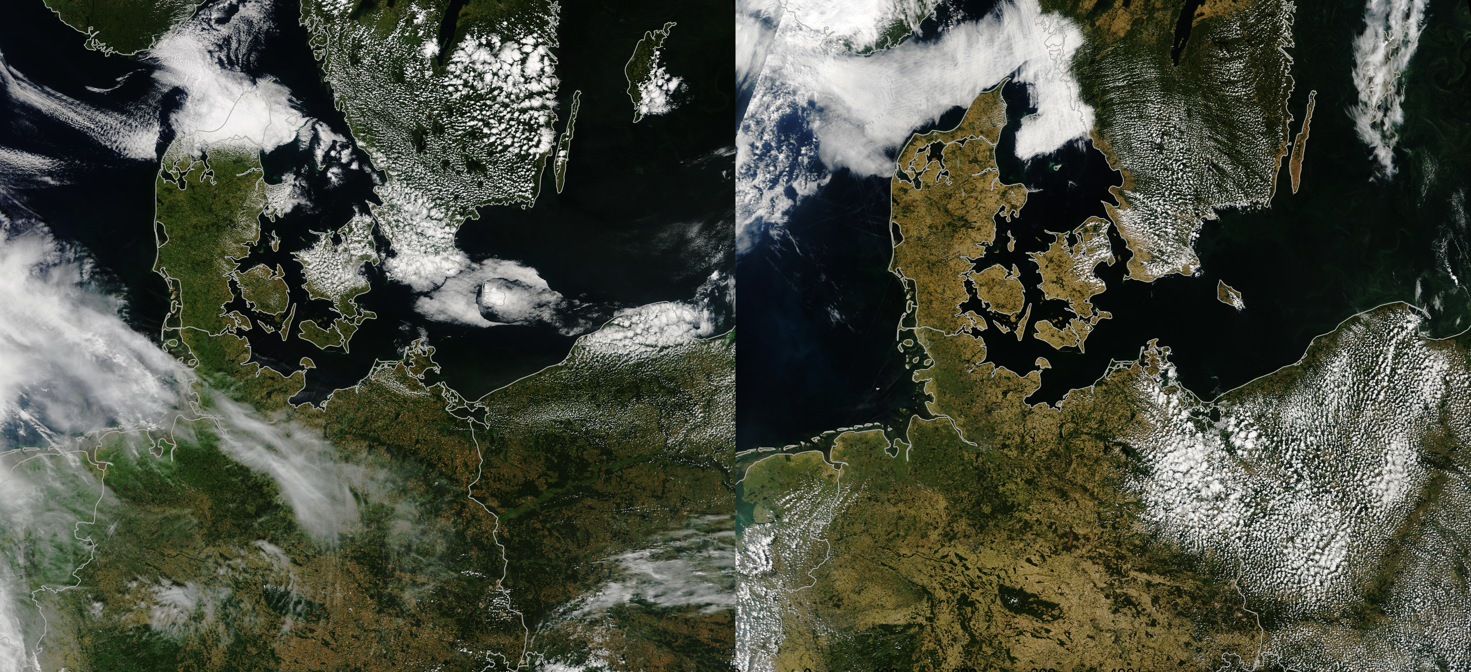 Vergleich von Norddeutschland und Dänemark zwischen dem 19. Juli 2017 und dem 24. Juli 2018